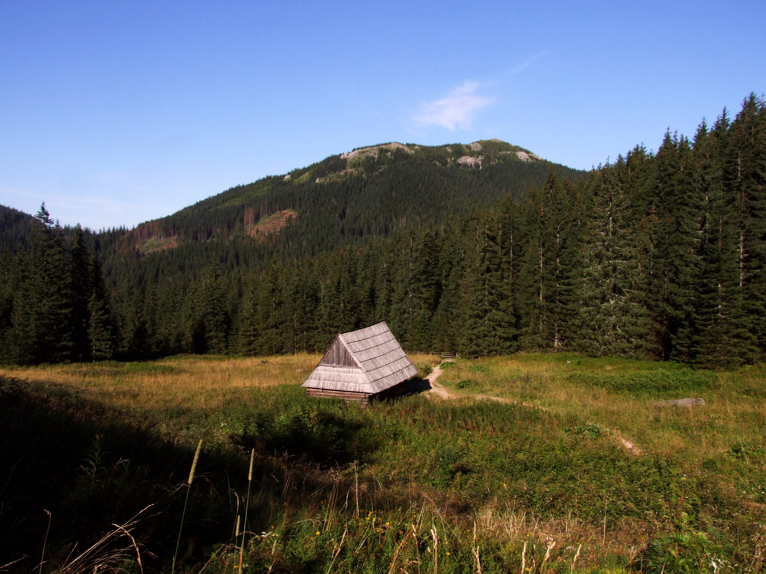 Widok z Polany Olczysko na Wielki Kopieniec